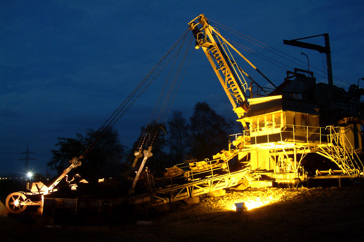 Hessisches Braunkohle Bergbaumuseum, Themenpark "Kohle & Energie", Saisonabschluss 2004, illuminierter Bagger